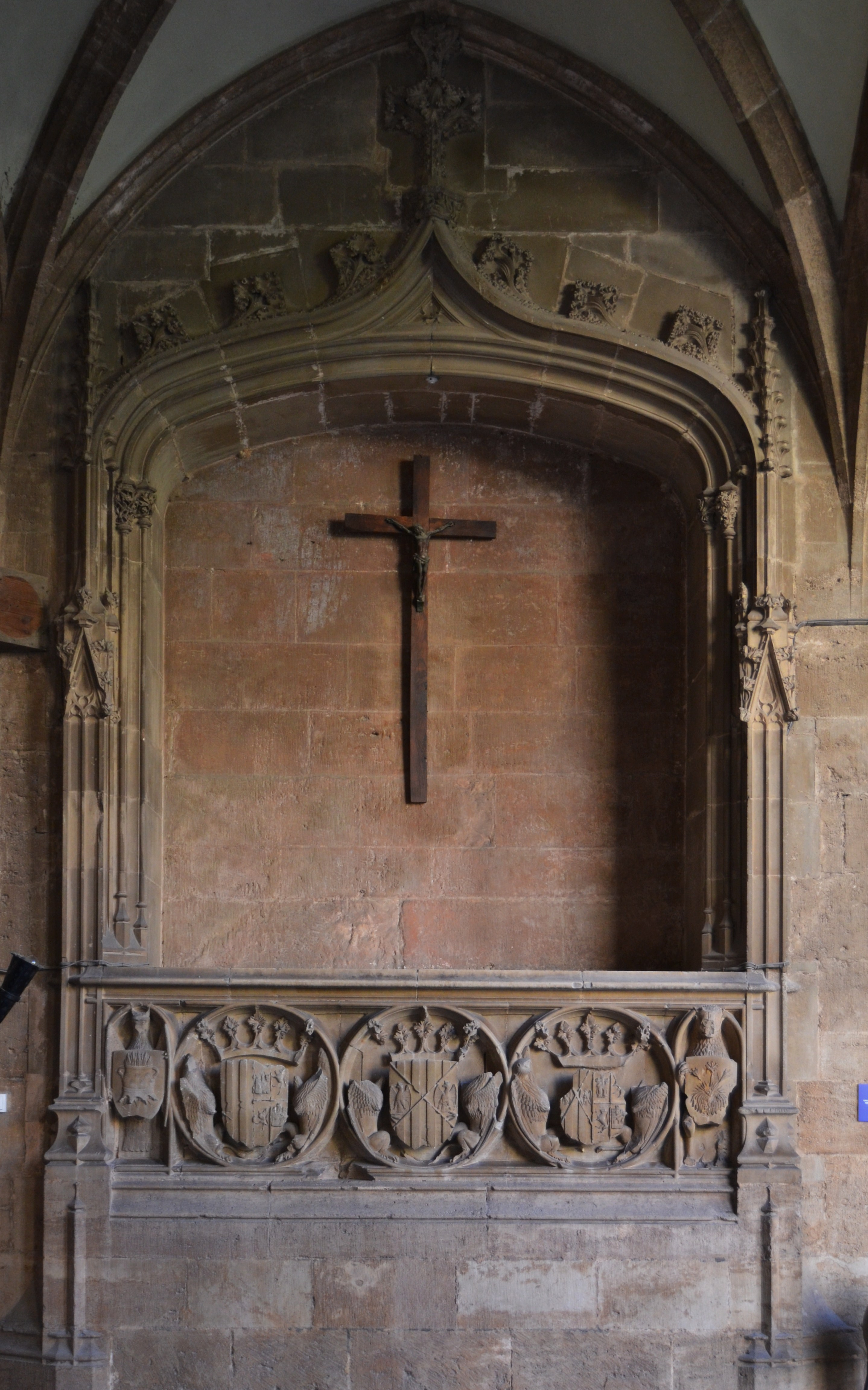 Monestir de la Trinitat de València, tomba de Maria de Castella.